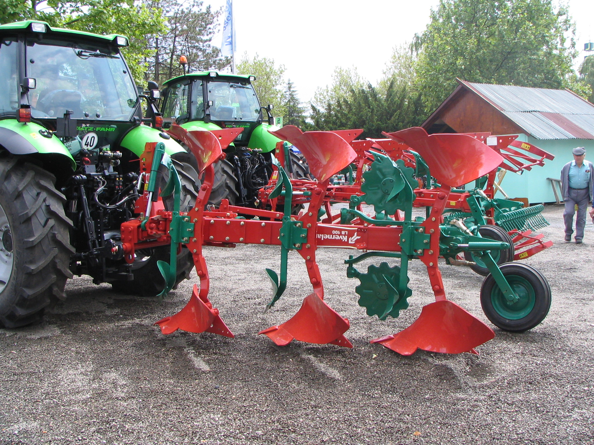 Плуг за глатко орање - тробраздни обртач. Пољопривредни сајам у Новом Саду 2006 (фото: Михаило Грбић)